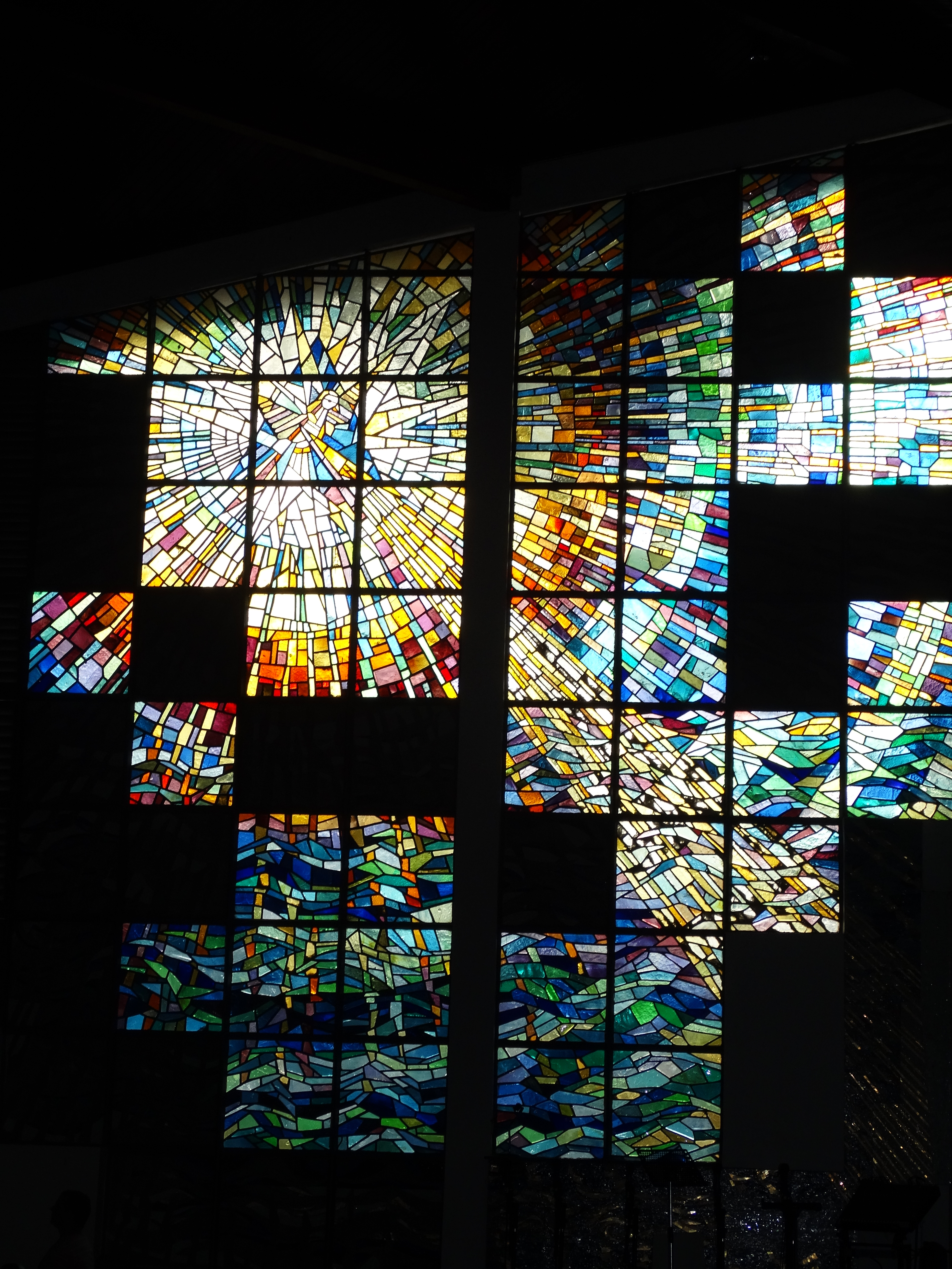 Vitral da Catedral Metropolitana Nossa Senhora da Abadia e Santo Antônio